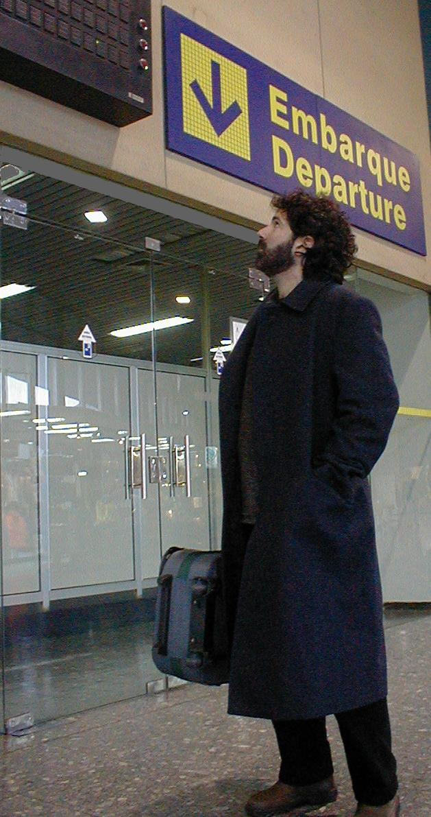 Fotografía del cantante uruguayo Gastón Rodríguez Aroztegui, tomada en el marco de la edición de su disco "Surnacimientos". Fotografía tomada por Diego López Brandón.